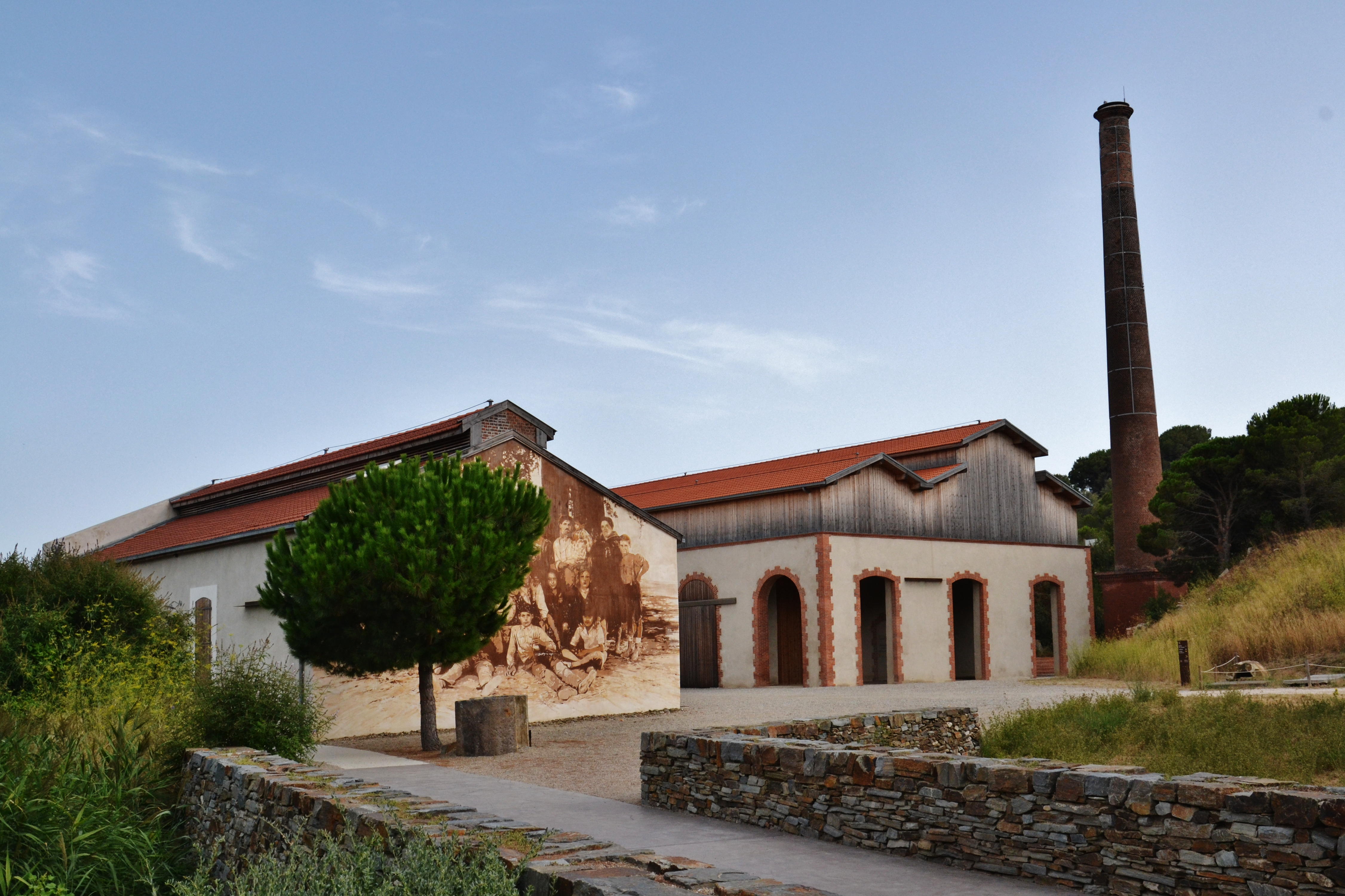 Le site réhabilité de l'ancienne dynamiterie de Paulilles, à Port-Vendres (Pyrénées-Orientales, France)